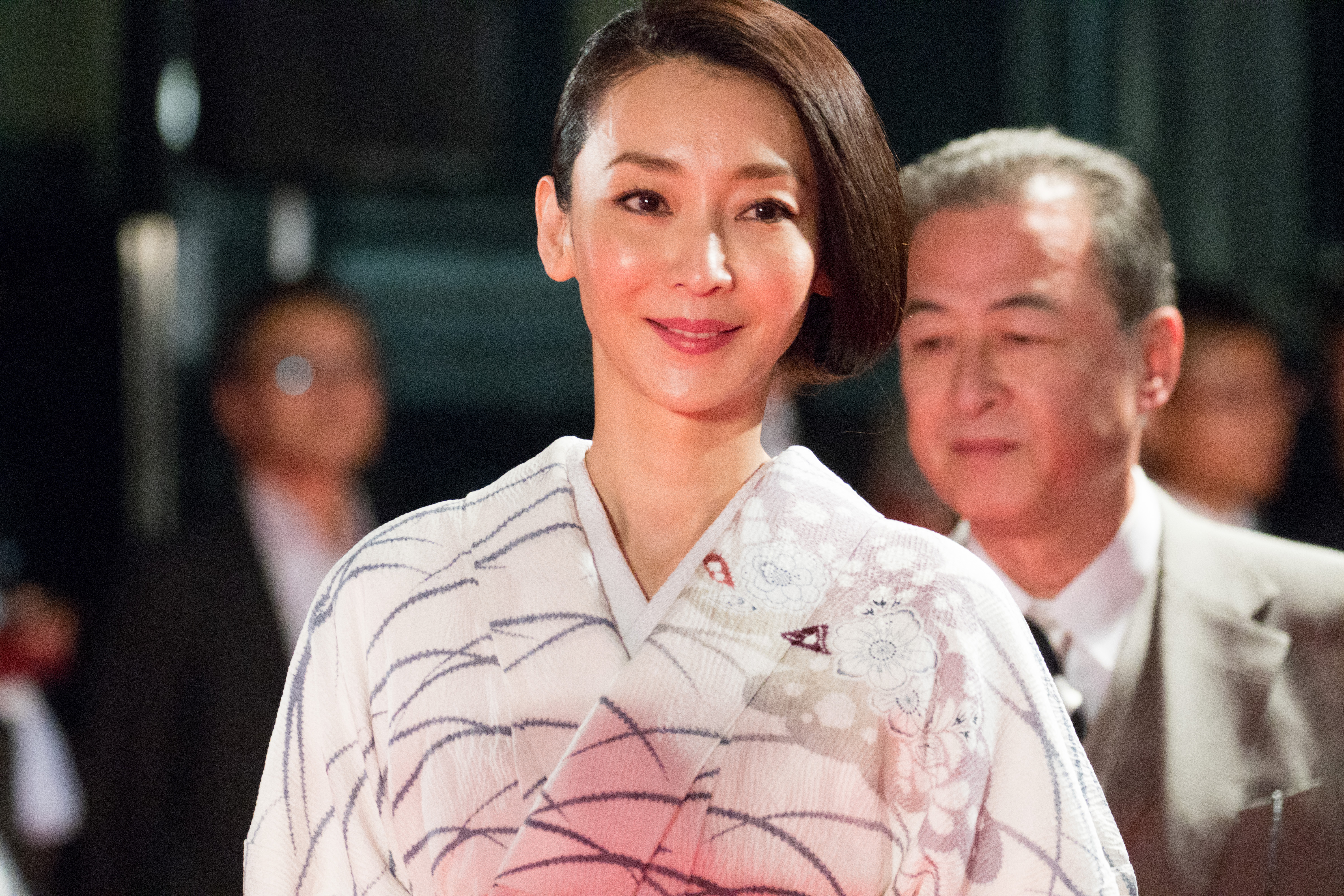 第29回 東京国際映画祭 オープニングセレモニー 稲森いずみ (乱鶯)